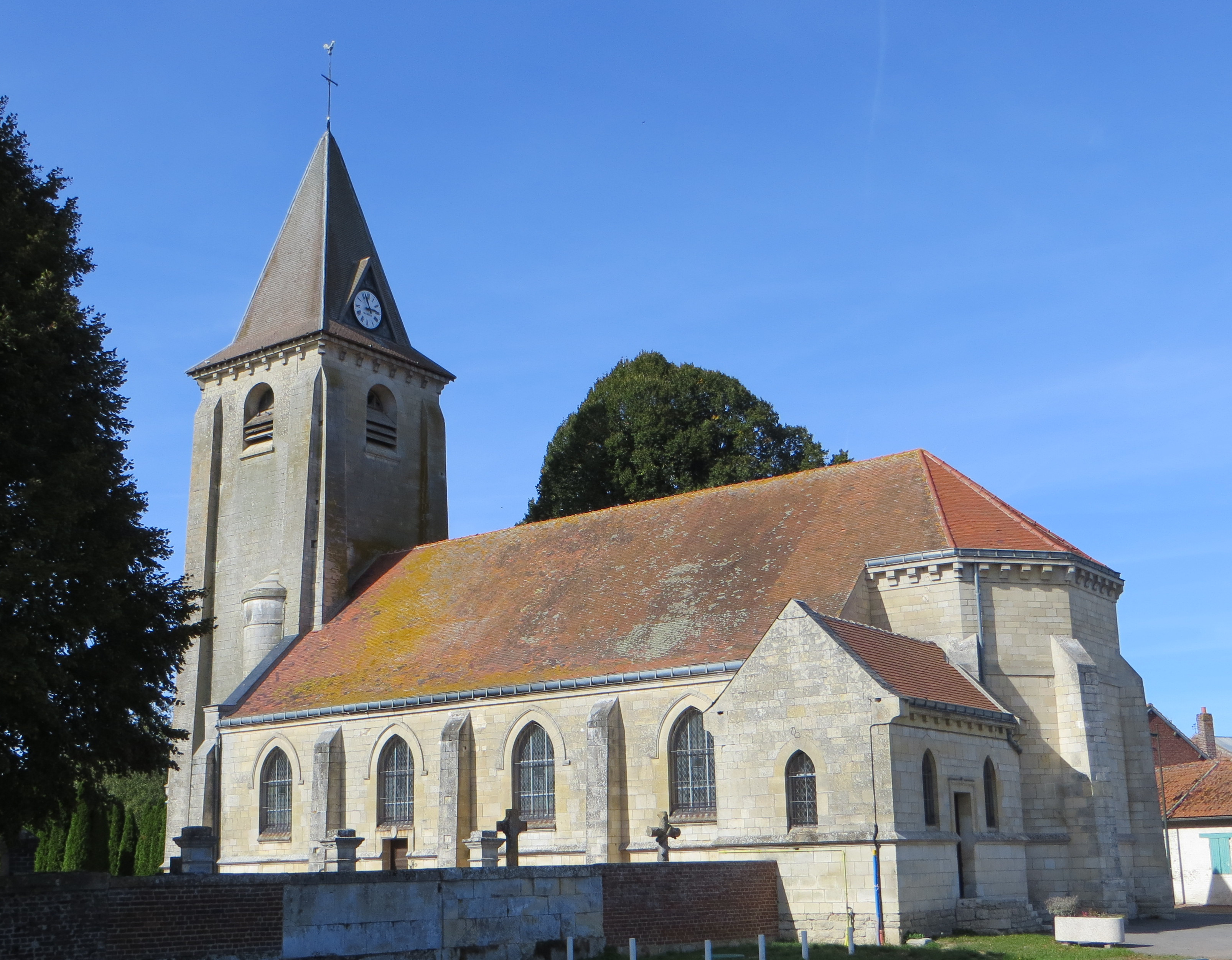 Vue générale de l'église